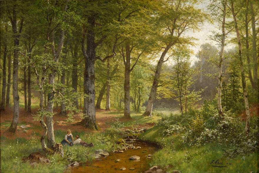 Die Beerensammler